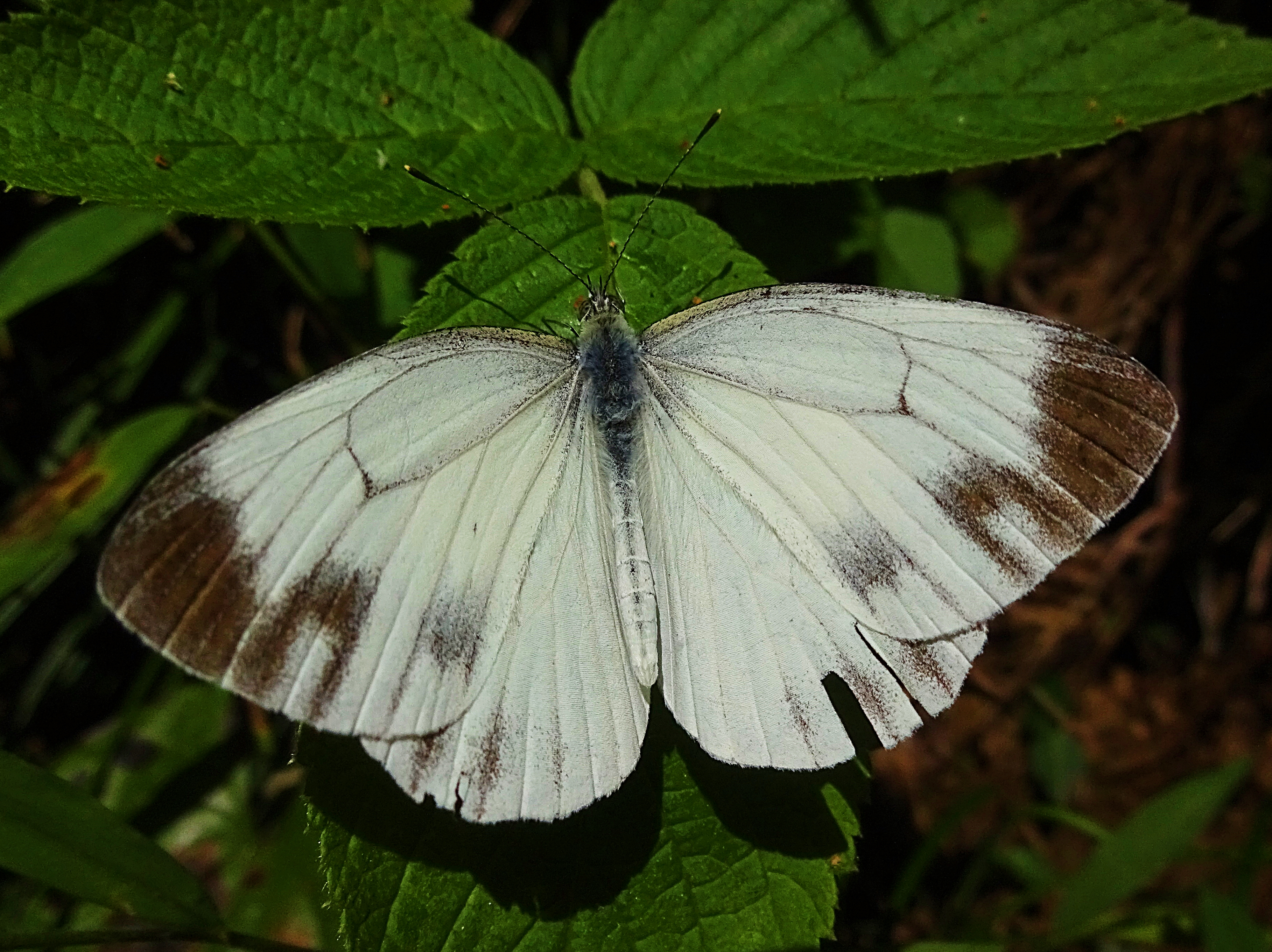 Pieris melete-Tokyo